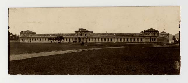 Colégio Militar